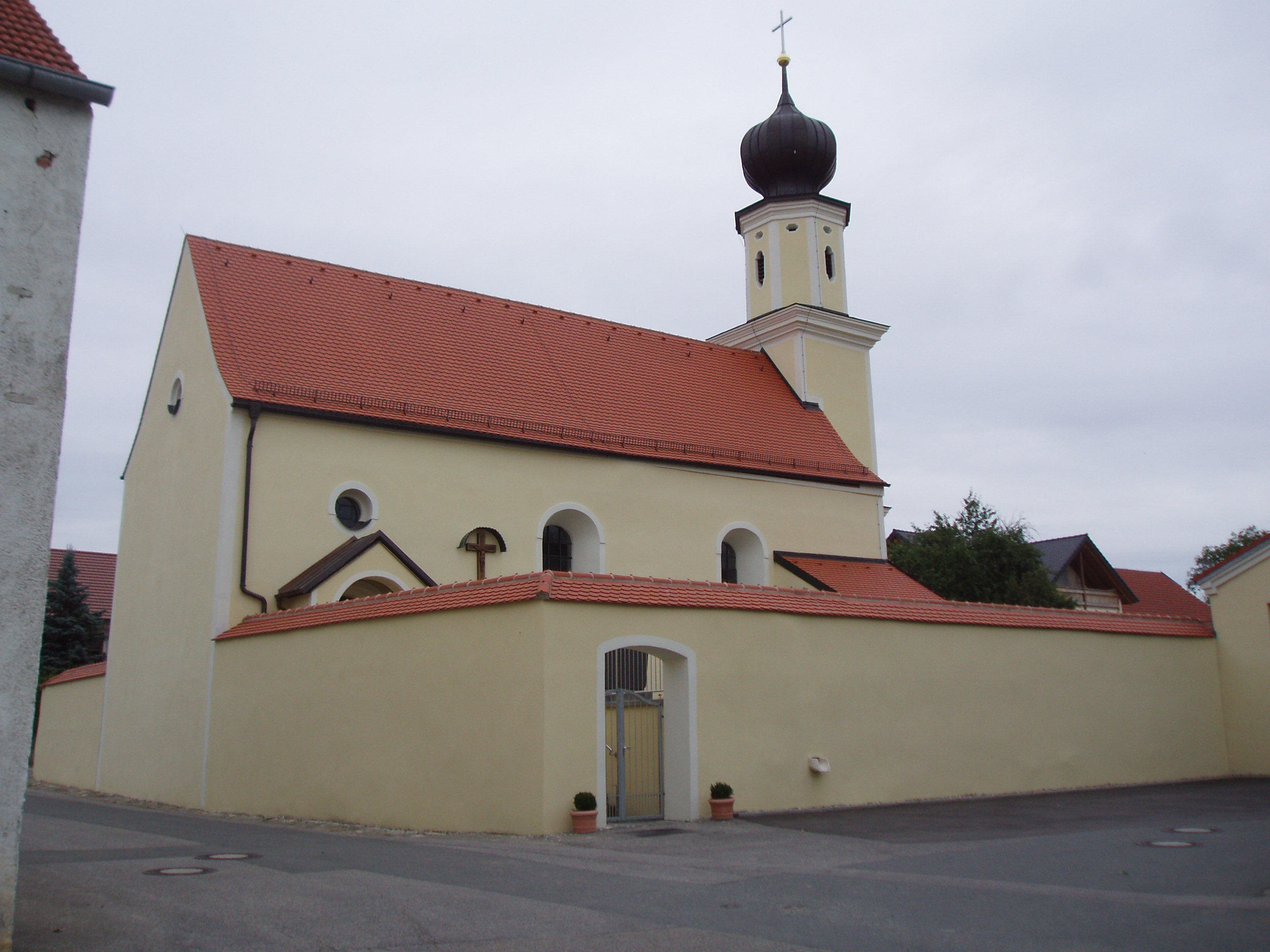 Hiendorf_im_Landkreis_Eichstätt,_Ortskirche